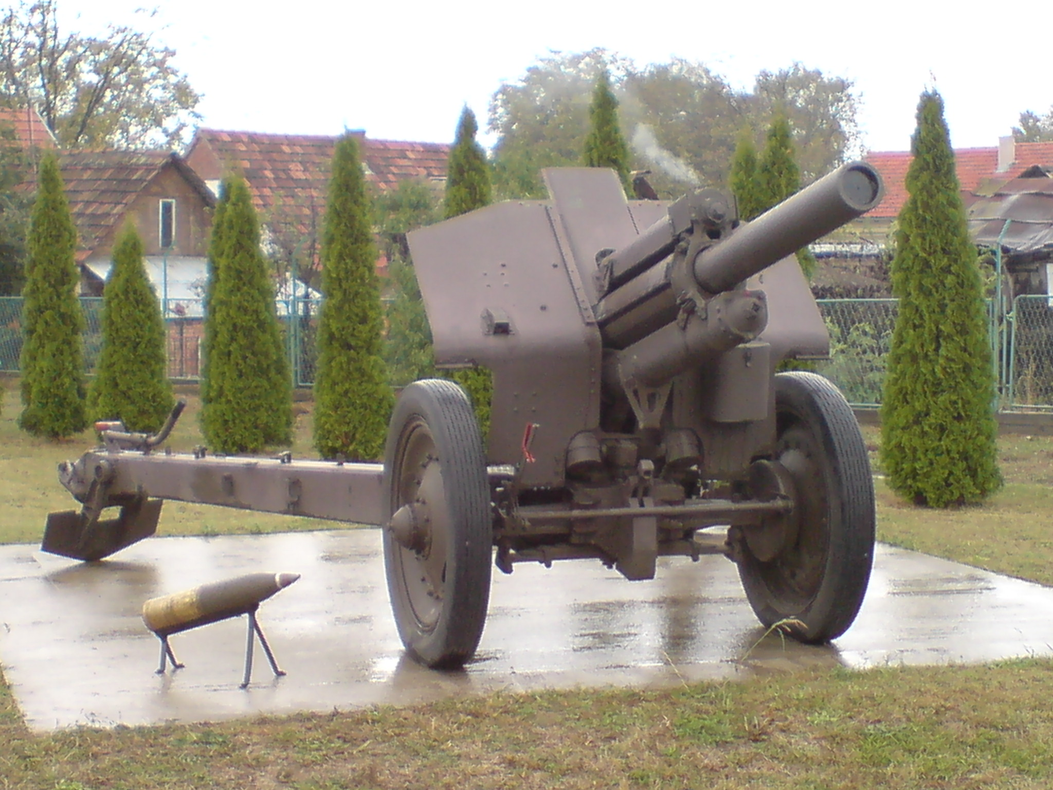 Vukovarska vojarna